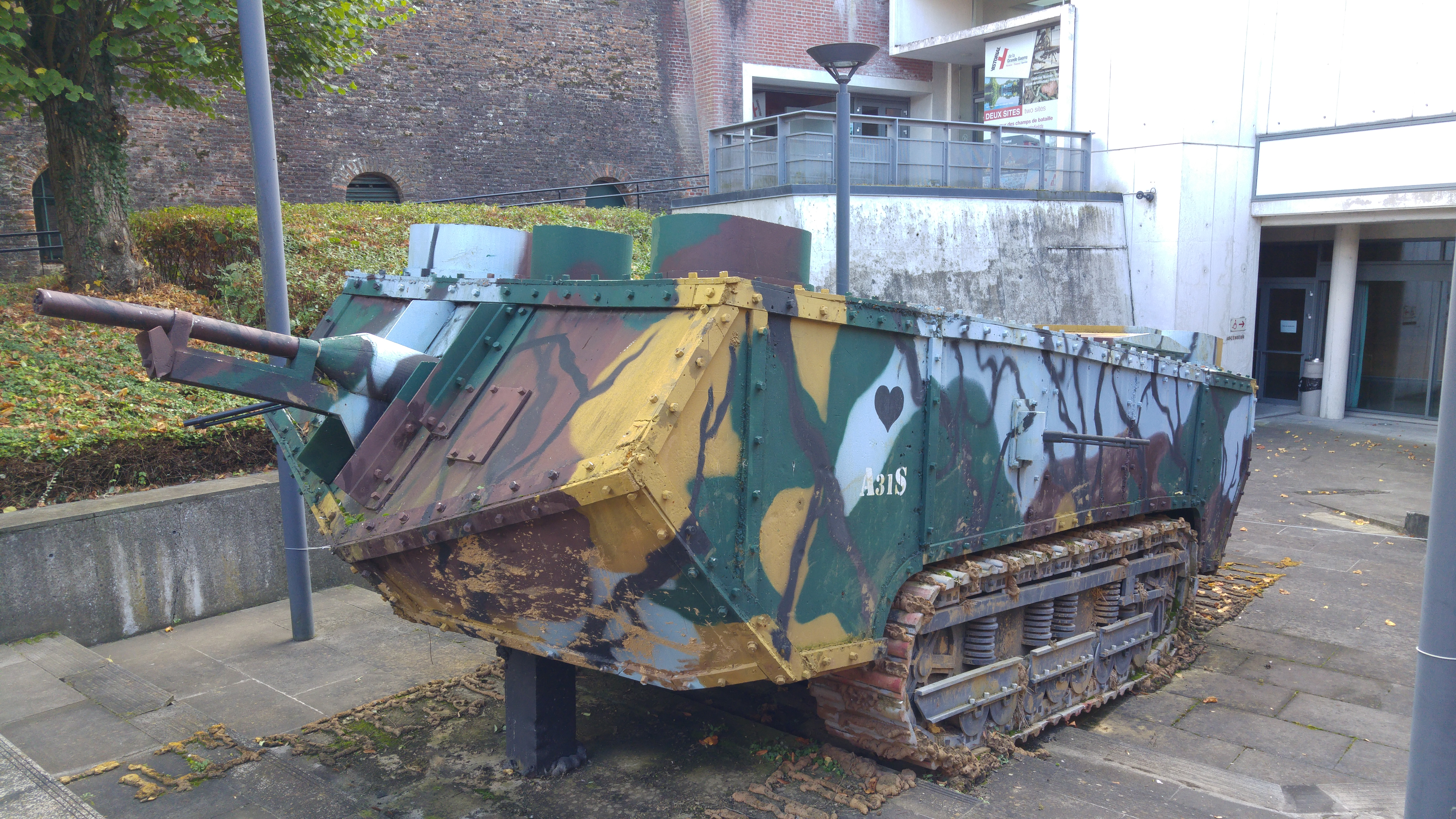 Französischer Panzer "St. Chamond" aus der Zeit des Ersten Weltkrieges im Innenhof des Museums "Historial de la Grand Guerre" in Peronne in Nordfrankreich